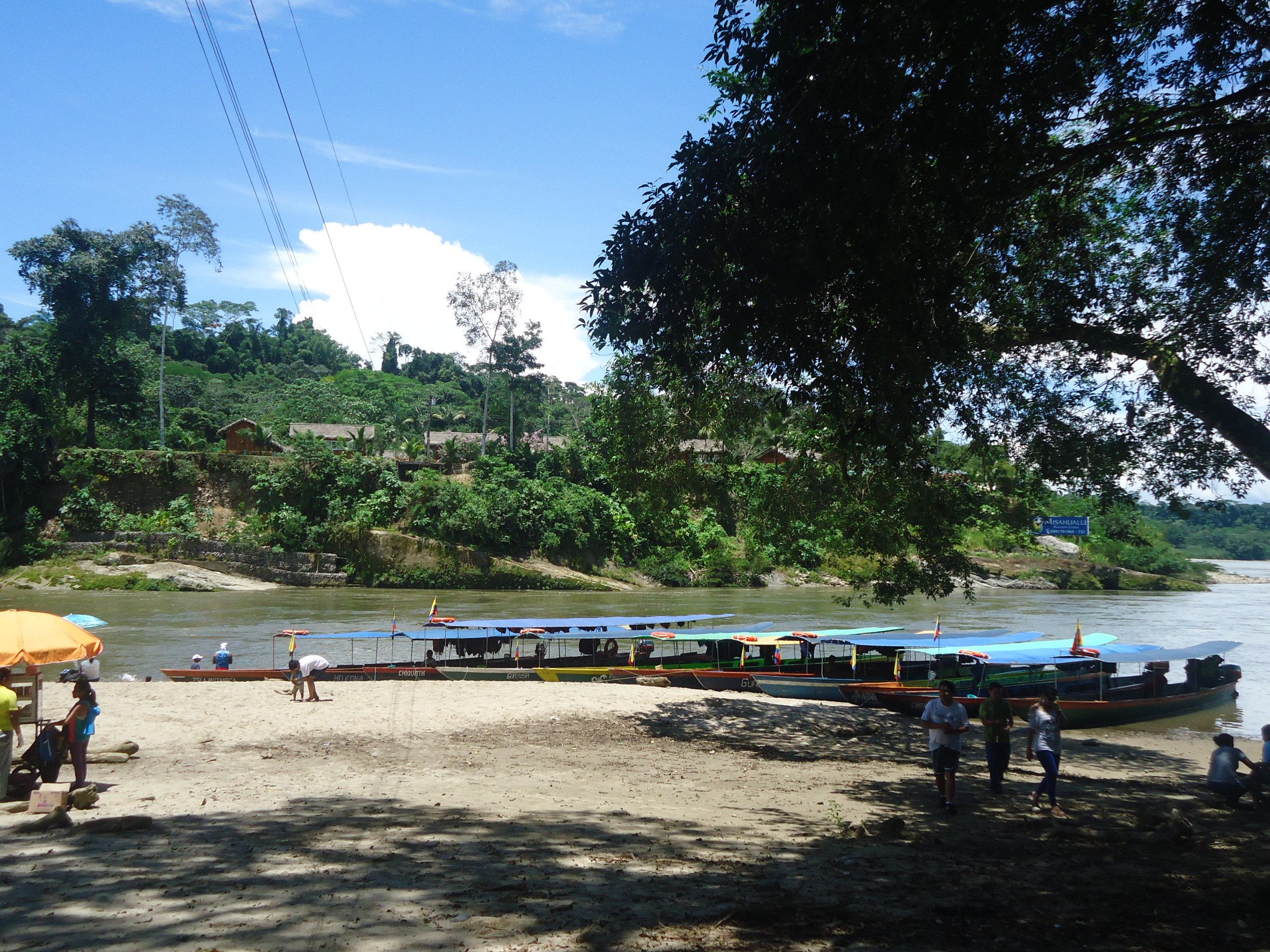 Botes en la Playa de Puerto Misahuallí, Provincia de Napo